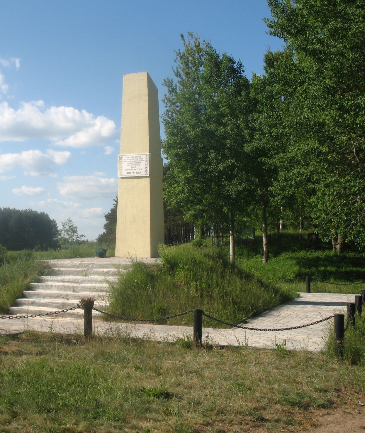 Памятник евреям из гетто в Чашниках, убитых нацистами и коллаборационистами. Установлен в деревне Заречная Слобода (Чашникский район, Витебская область).